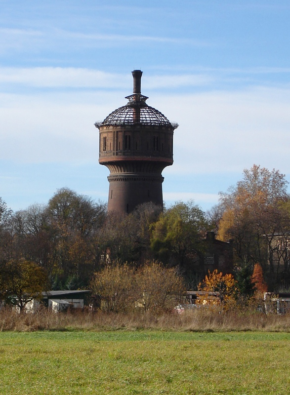 Wasserturm in Magdeburg-Salbke